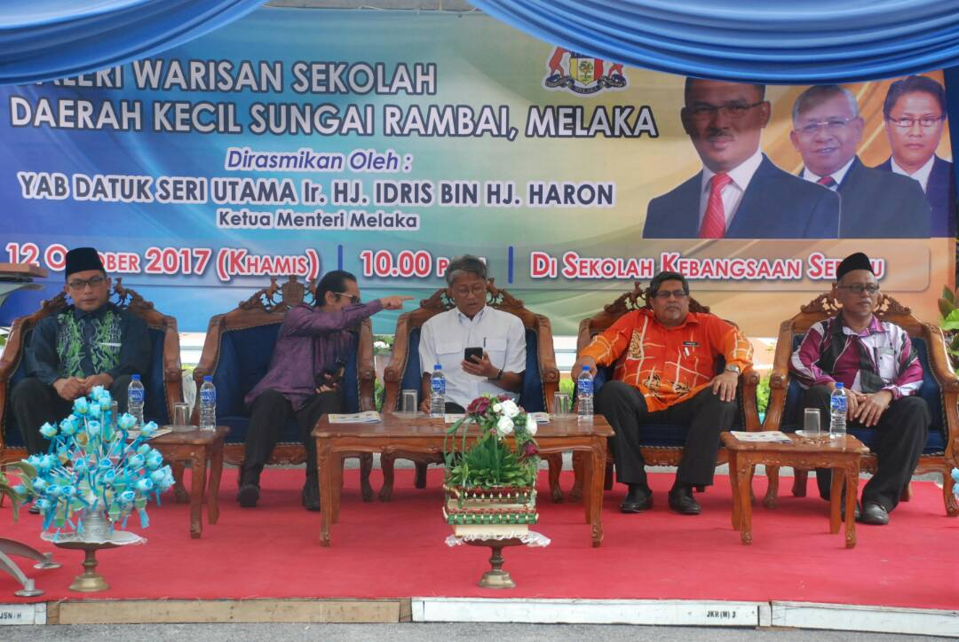 Antara jemputan tetamu kehormat majlis